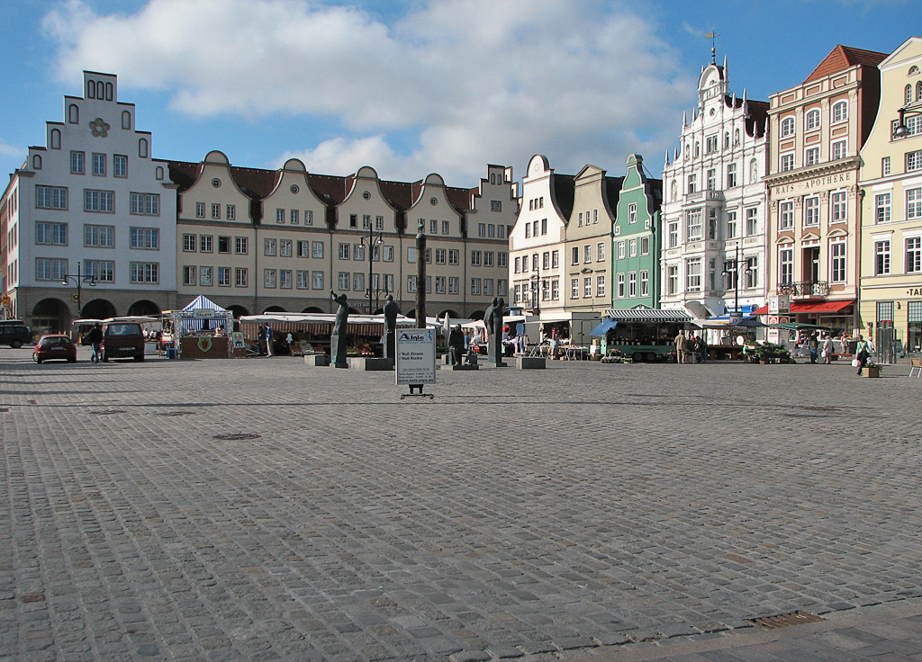 Beschreibung: Neuer Markt in Rostock / Germany Fotograf: Darkone, 17. August 2005